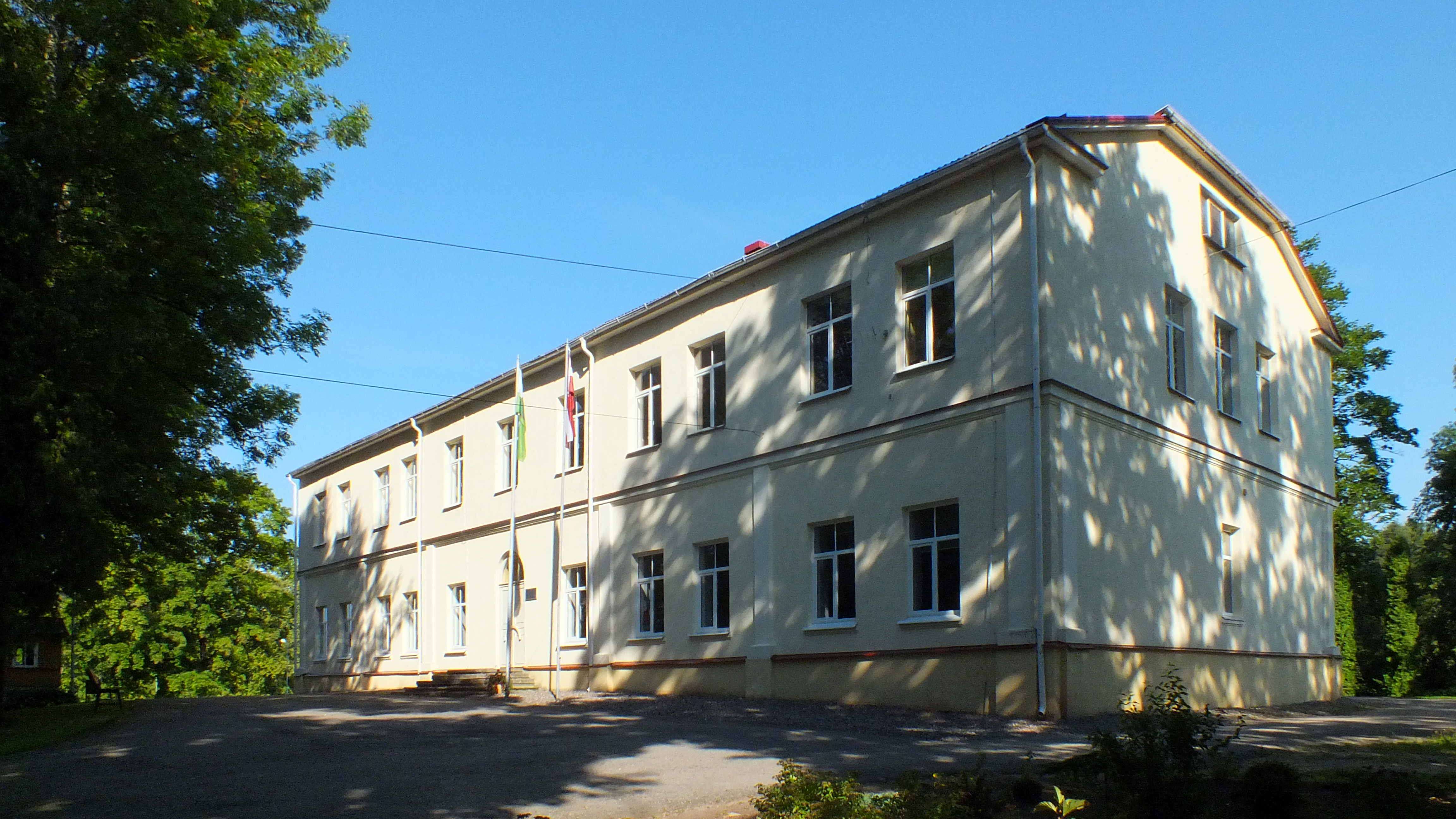 Gaigalavas skola